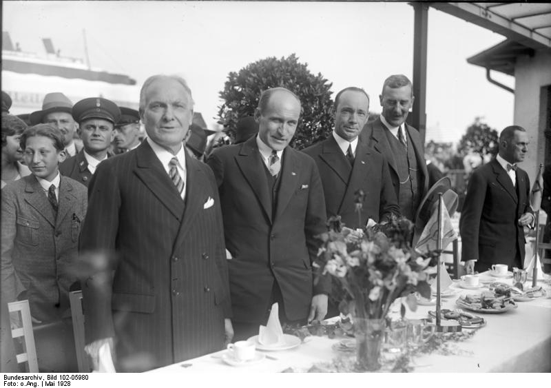 Jubelnder Empfang der erfolgreichen Nordpolflieger Hauptmann Wilking und Leutnant Eyelson nach ihrer Ankunft aus Kopenhagen auf dem Centralflughafen in Berlin. Anwesend waren Vertreter der Reichsregierung , der Stadt Berlin sowie der amerikanische und englische Botschafter in Berlin. v.lin.re.: der amerikanische Botschafter in Berlin Schurman, die erfolgreichen Nordpolflieger Leutnant Eyelson, Hauptmann Wilkins, der englische Botschafter in Berlin Lindsay an der Festtafel auf dem Centralflughafen in Berlin nach der Landung aus Kopenhagen.